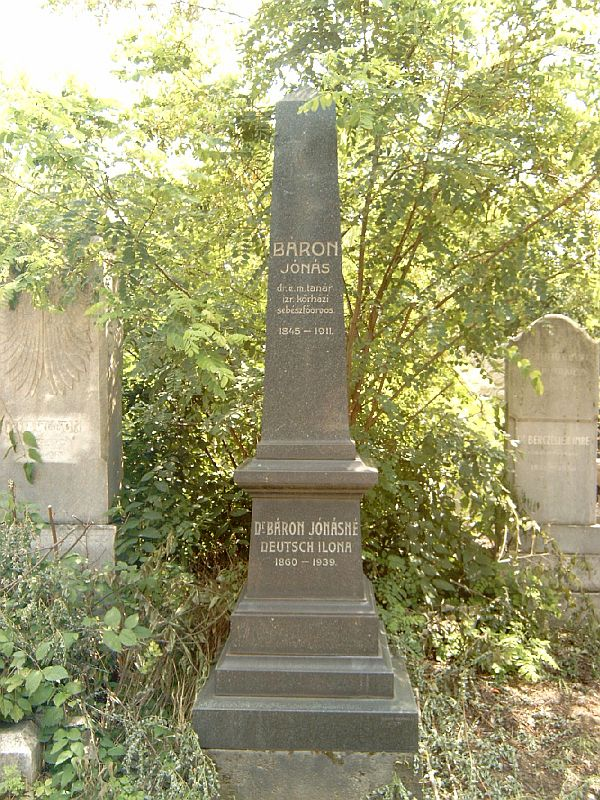 Baron Jónás sírja Budapesten. Kozma utcai izraelita temető: 5-1-17.